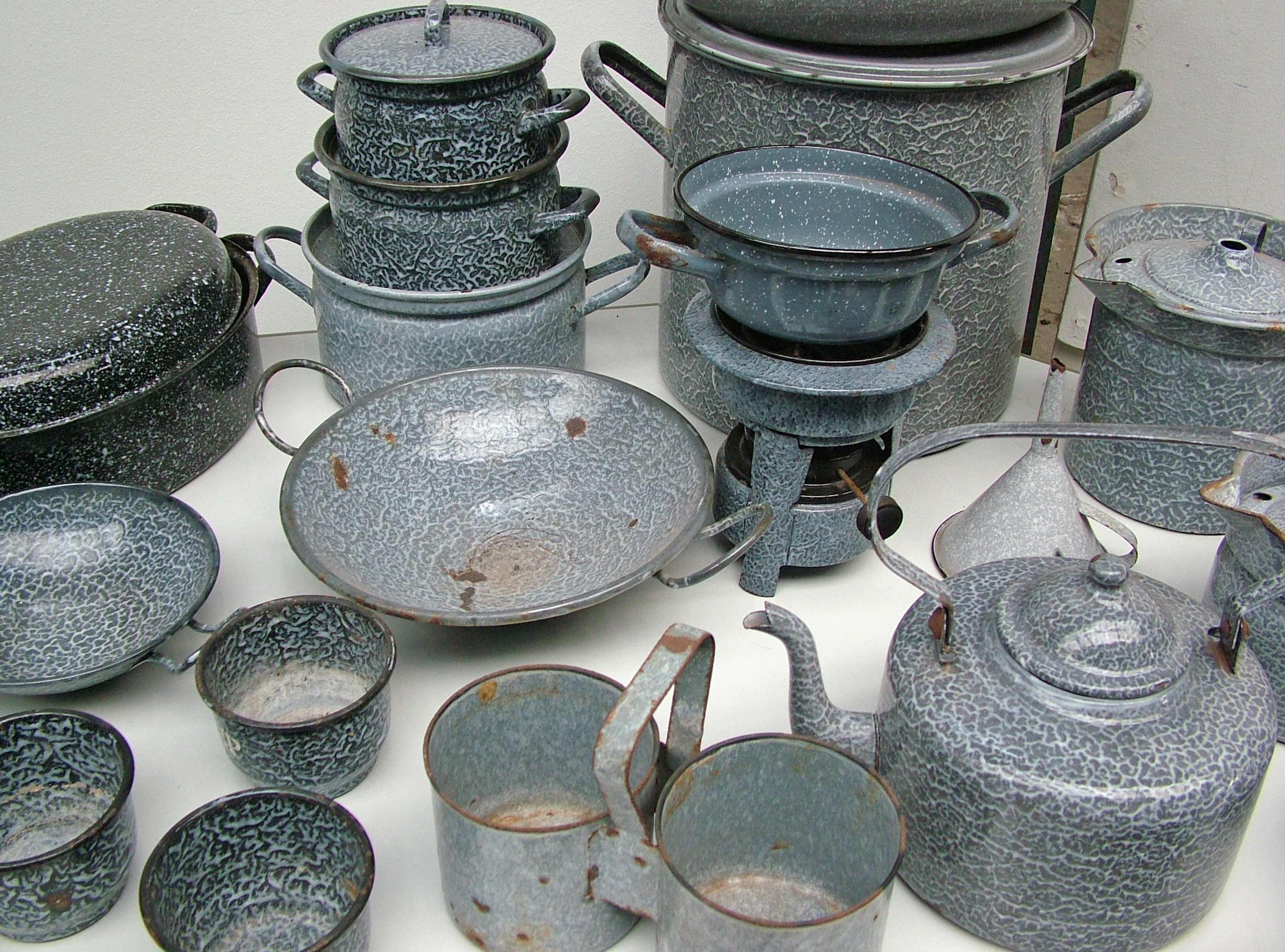 DRU complex in 2008. Grijs gewolkt, emaille van de DRU.